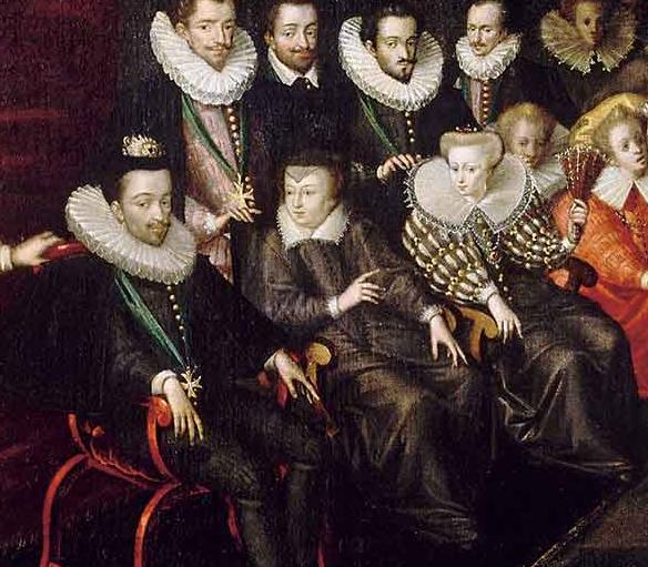 Particolare del dipinto "Il ballo dopo le nozze del duca di Joyeuse", che raffigura il re Enrico III in compagnia della madre Caterina de' Medici e della moglie Luisa di Lorena-Vaudémont.